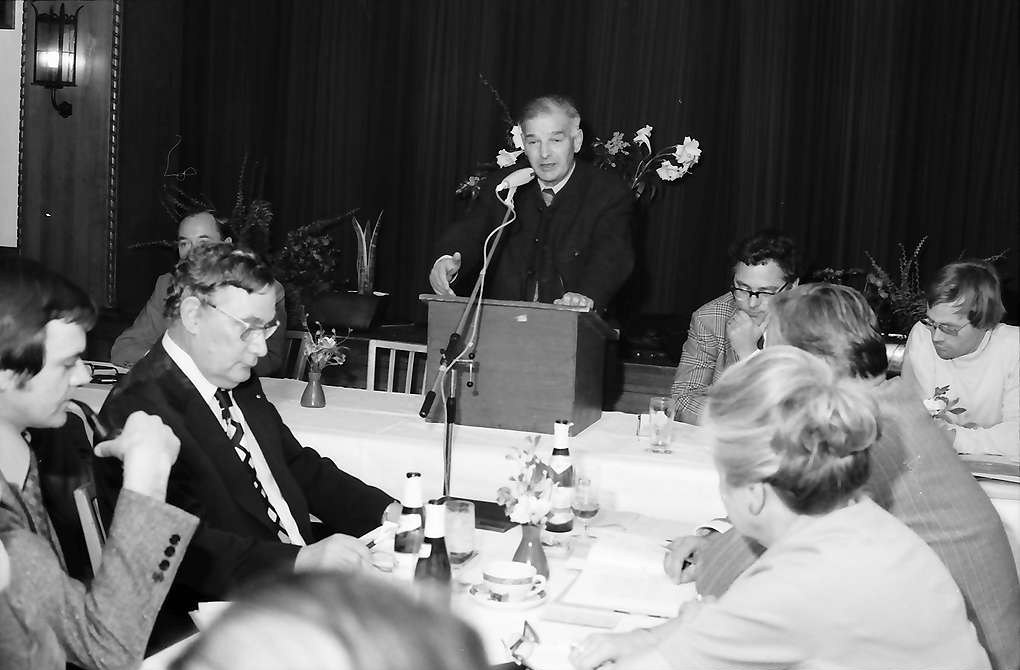 Findbuch W 134 (Filmegative III): Fotosammlung Willy Pragher: Filmnegative III, Bildordner 804-1921 Zeitgeschehen 1950er bis 1980er Jahre [Filmnegative, Ordner 0904] Landtagswahl und Protest gegen die Schwarzwaldautobahn 1967/1968 in St. Märgen W 134 Nr. 099567b Archivalieneinheit St. Märgen: Schwarzwaldautobahn; Protestversammlung gegen Bau der Schwarzwaldautobahn, Redner F. Hockenjos